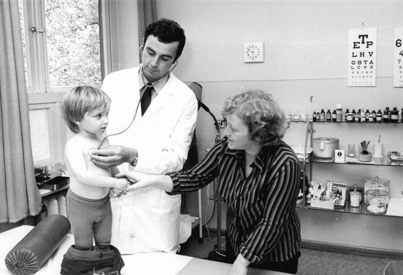 Carlow, kinderärztliche Untersuchung ADN-ZB Pätzold-1.11.82 pe Bez. Schwerin: Bei Dr. med Torsten Regal sind auch die Jüngsten in guten Händen. Der Mediziner ist im Landambulatorium von Carlow, Kreis Gadebusch, tätig. Dort sorgen rund 30 Ärzte, Schwestern und Mitarbeiter für das Wohl ihrer Patienten. Sie betreuen über 4000 Bürger in neun Gemeinden und 32 Ortsteilen. Neben der medizinischen Grundbetreuung gibt es in Carlow im Landambulatorium auch eine Röntgenabteilung, ein Labor und eine Apotheke. In der DDR gibt es über 400 Landambulatorien. Information added by Wikimedia users.English description: A male doctor listening to a young boy's heart and lungs.